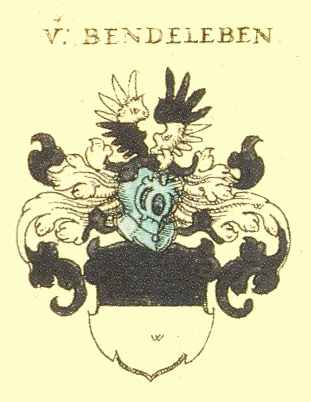 Wappen der Thüringischen Adelsfamilie Bendeleben